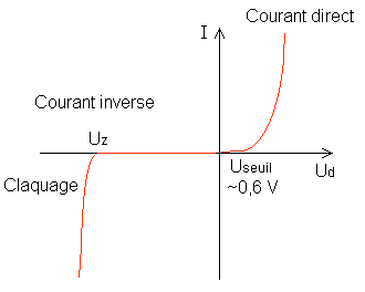 Tout est dans le nom du fichier. Courbe faite maison, j'en suis l'auteur. Je mets cette image en licence GFDL.